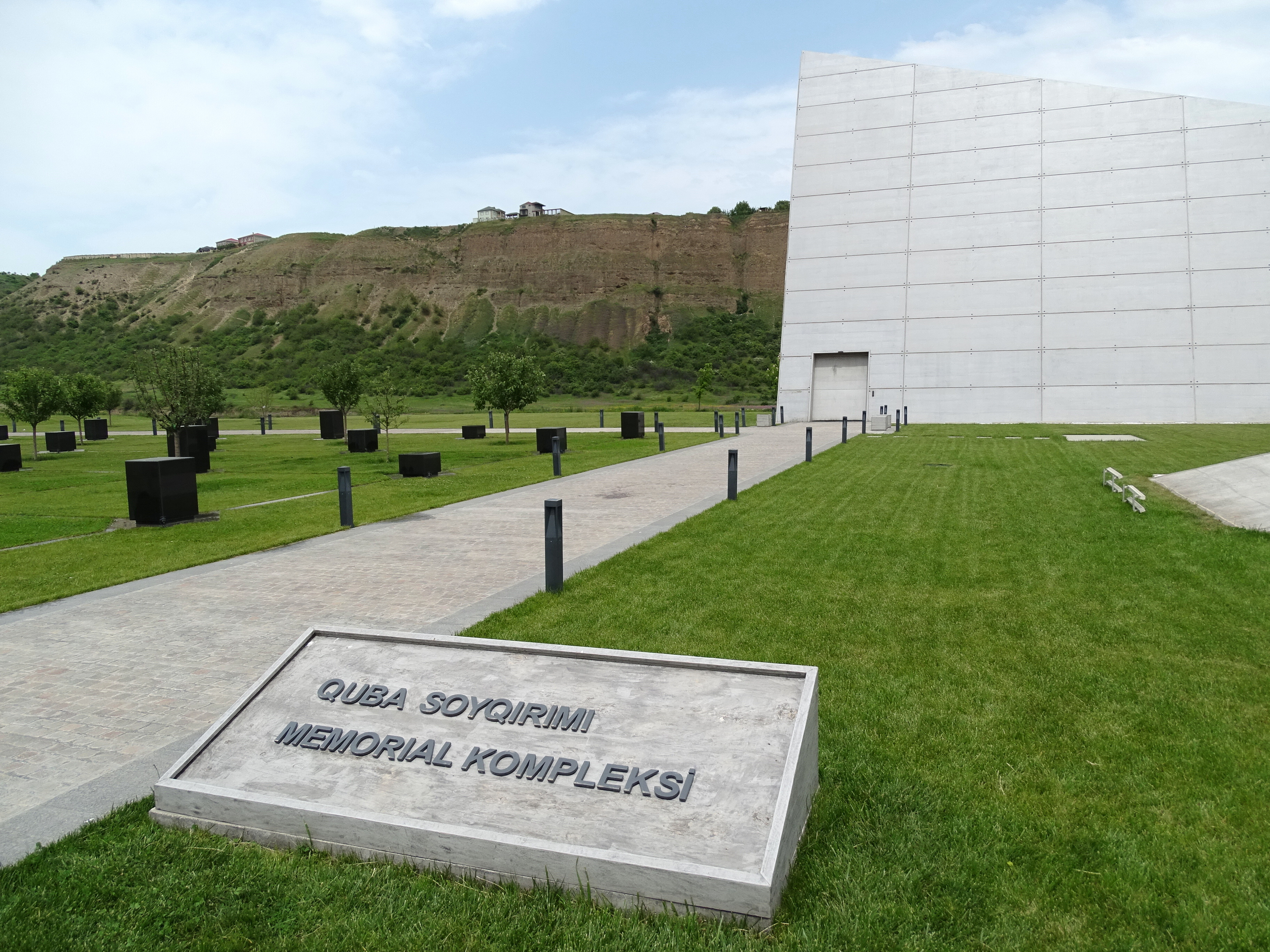 Quba Soyqirimi Memorial Complex - Quba - Azerbaijan - 08